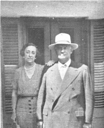 Regina visita por primera vez a su esposo, exiliado en la isla Martín García. Cruzaría el bravío río más de cincuenta más, a veces desafiando furiosos oleajes, para llevar, a su adorado Marcelo, mudas, comida y aliento., 1933